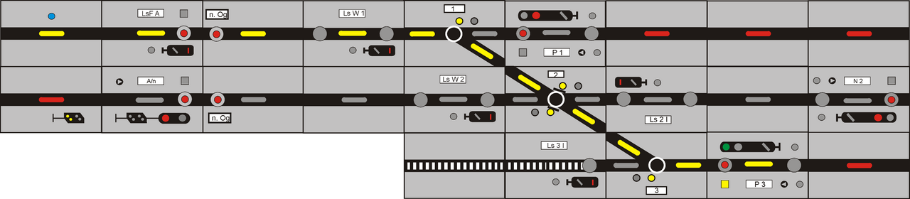 Stelltafel-Ausschnitt eines Sp Dr S 60-Stellwerkes mit eingestellter Zugstraße, Lizenz: frei